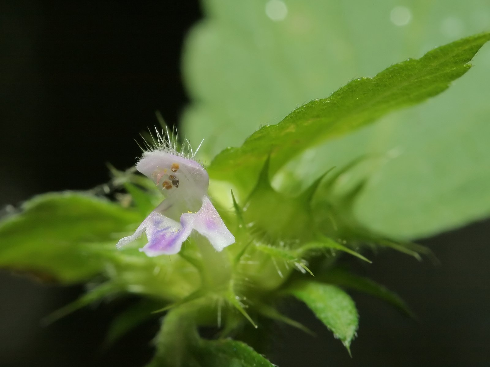 Zweispaltiger Holzahn (Galeopsis bifida)